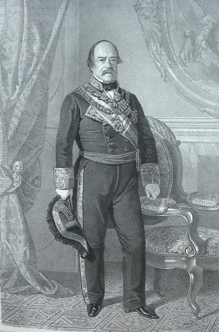 Retrato del militar y aristócrata español Joaquín Fernández de Córdoba (1787-1873), que fue duque de Arión y marqués de Malpica y de Mancera.